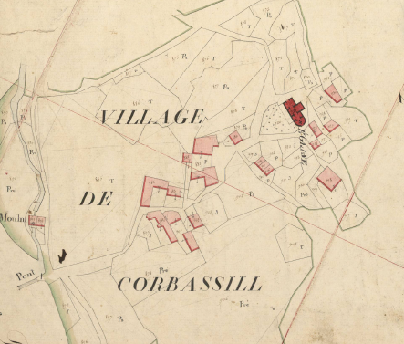 Cortvassill, de Porta, en el Cadastre Napoleònic del 1812 (Arxius Departamentals dels Pirineus Orientals)